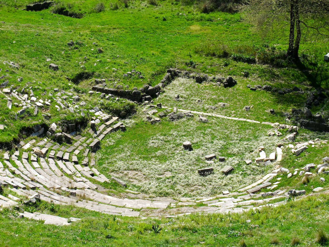 Αρχαίο θέατρο Γιτάνων